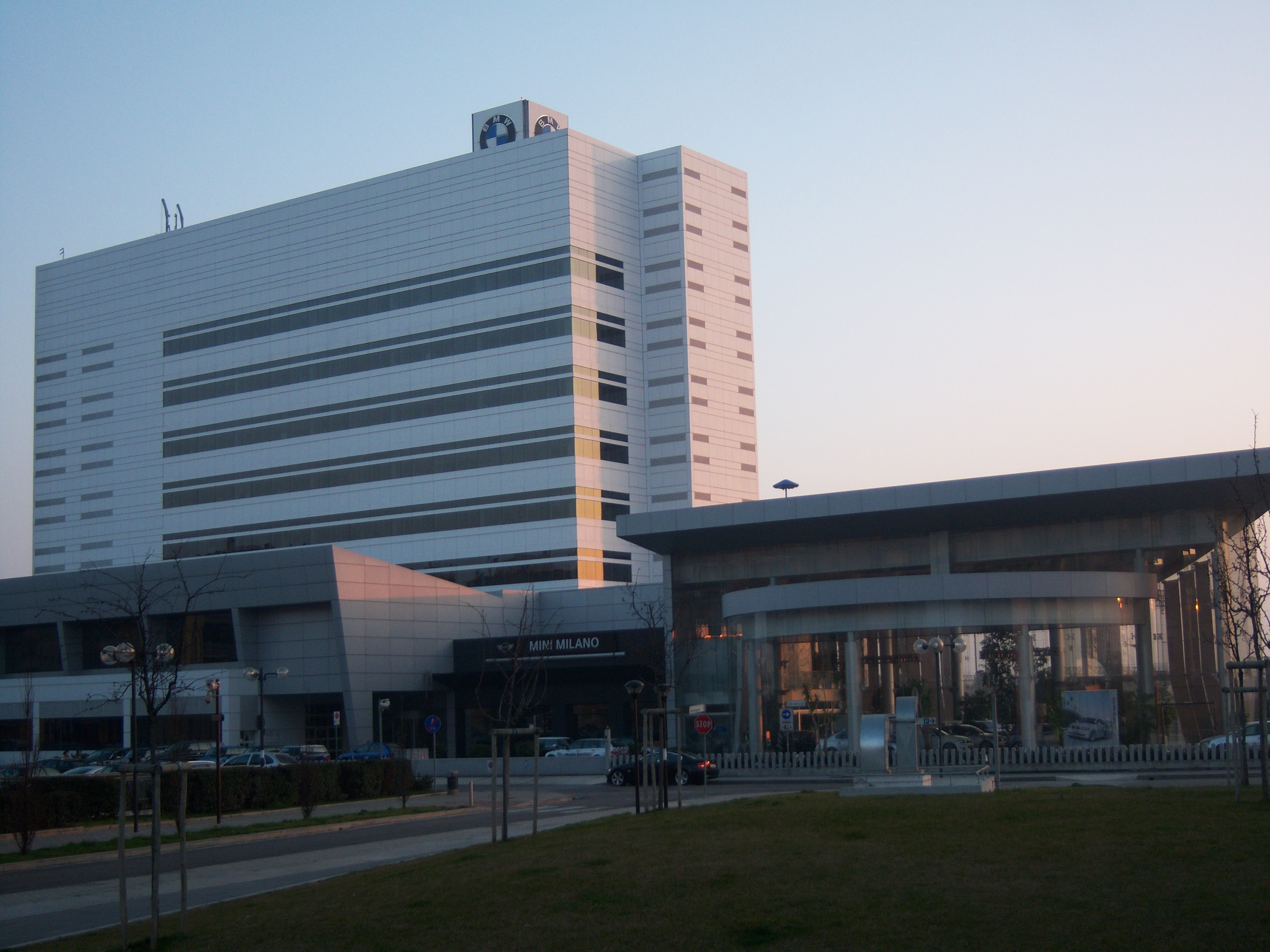 Palazzo_BMW di Tangi